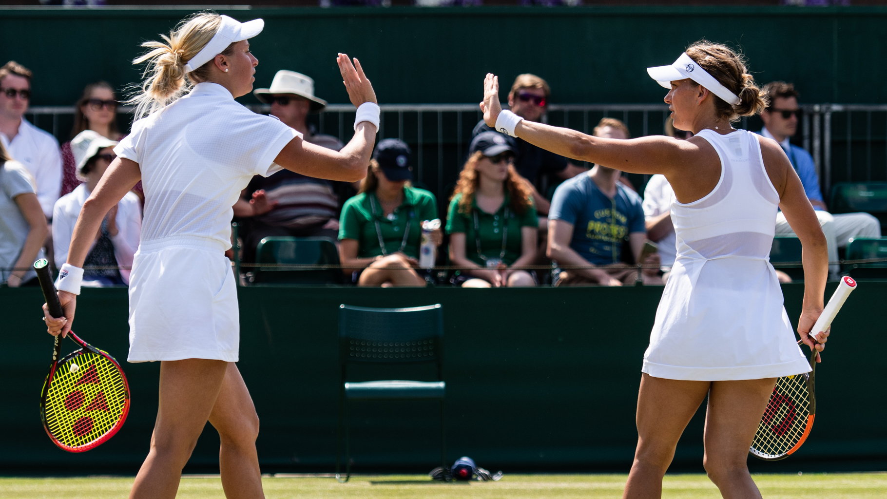 Bara Strycova & Andrea Sestini-Hlavackova